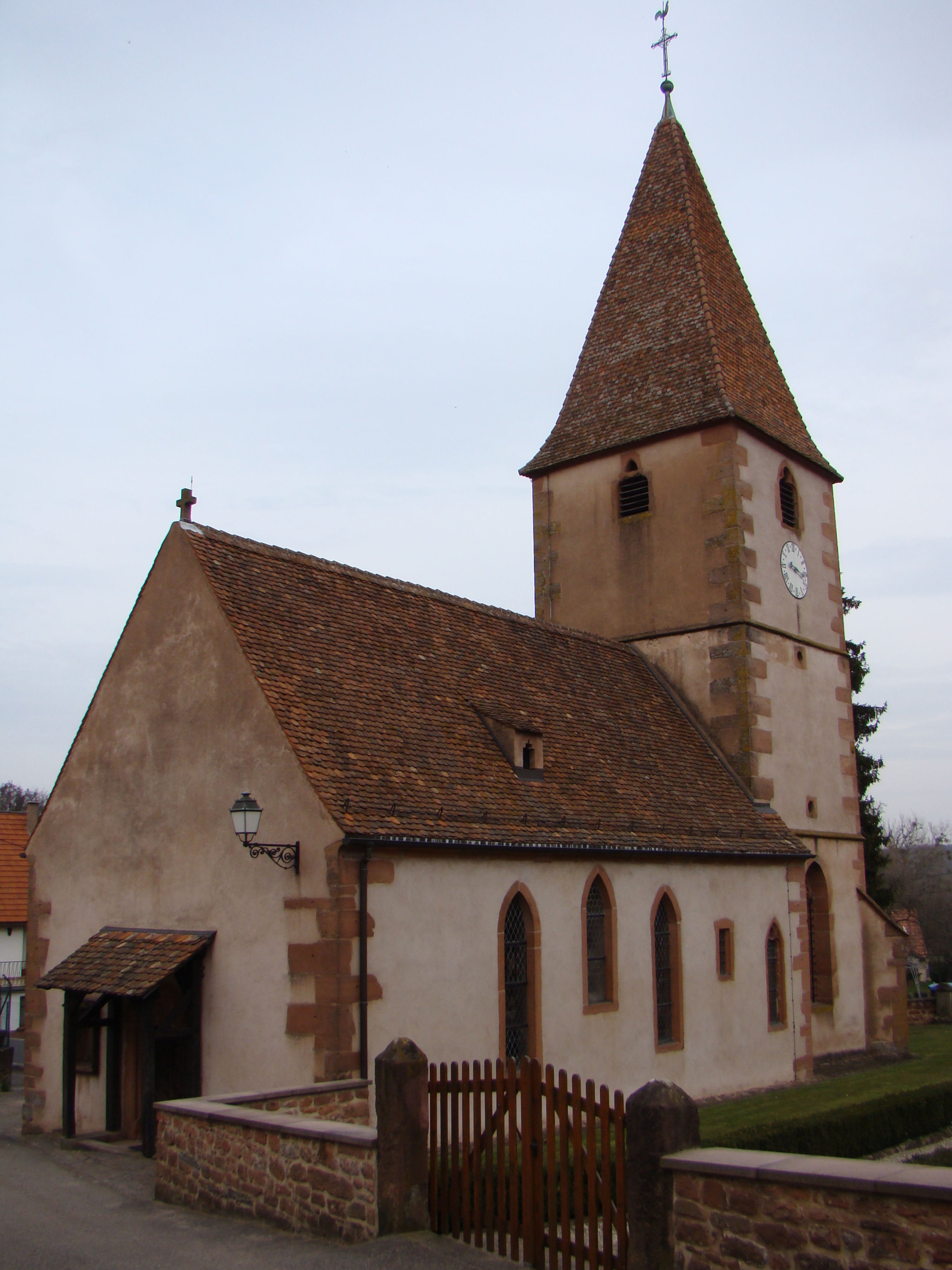 Église luthérienne de Weiterswiller (Bas-Rhin). Vue extérieure.